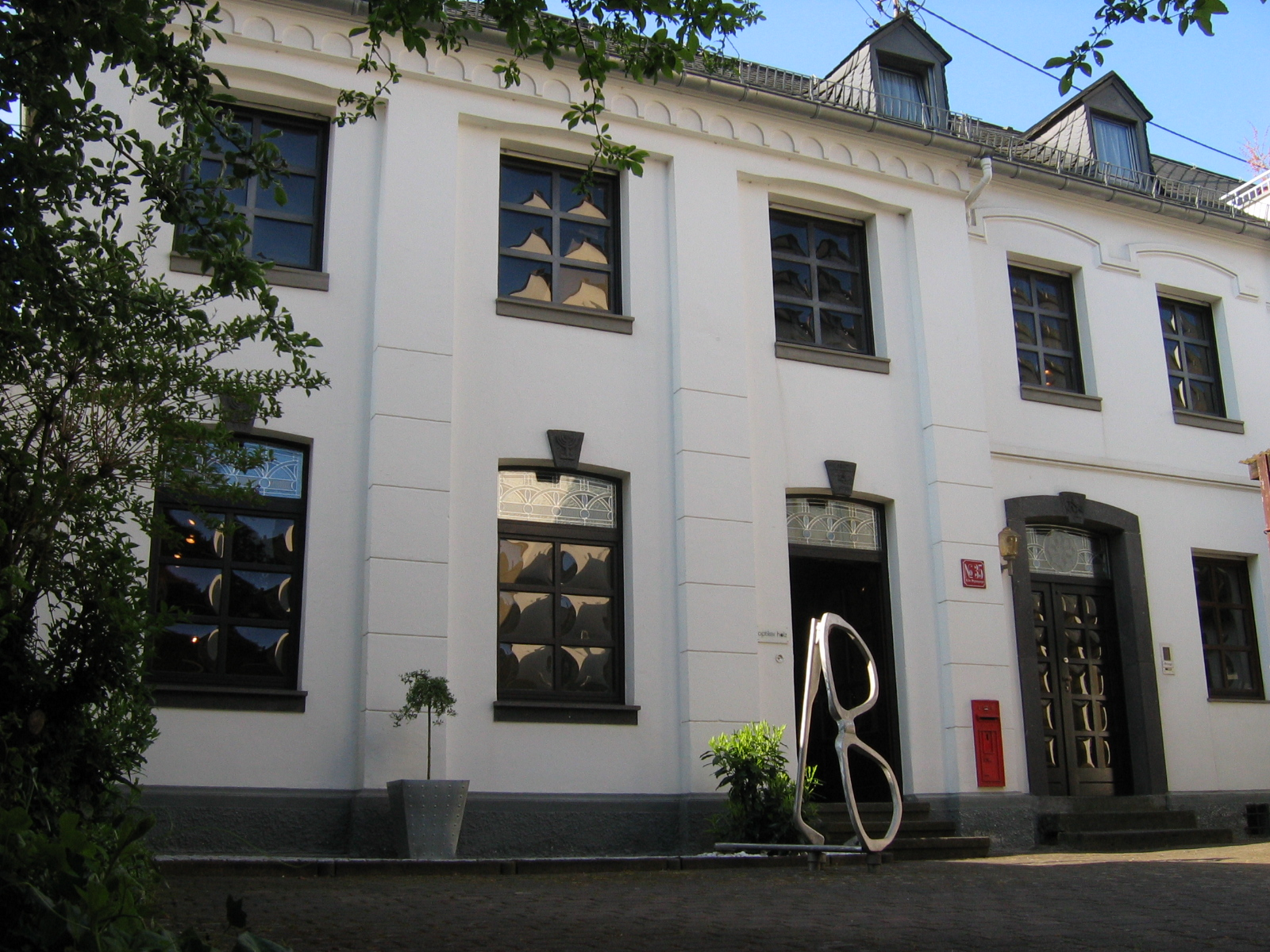 ehemalige Synagoge